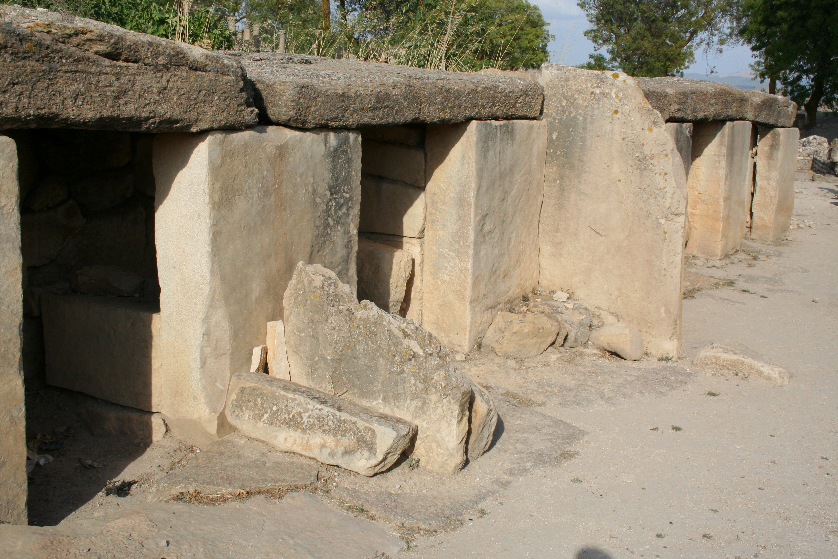 Mégalithes de Ellesse